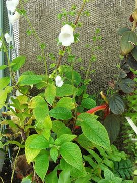 Public Domain